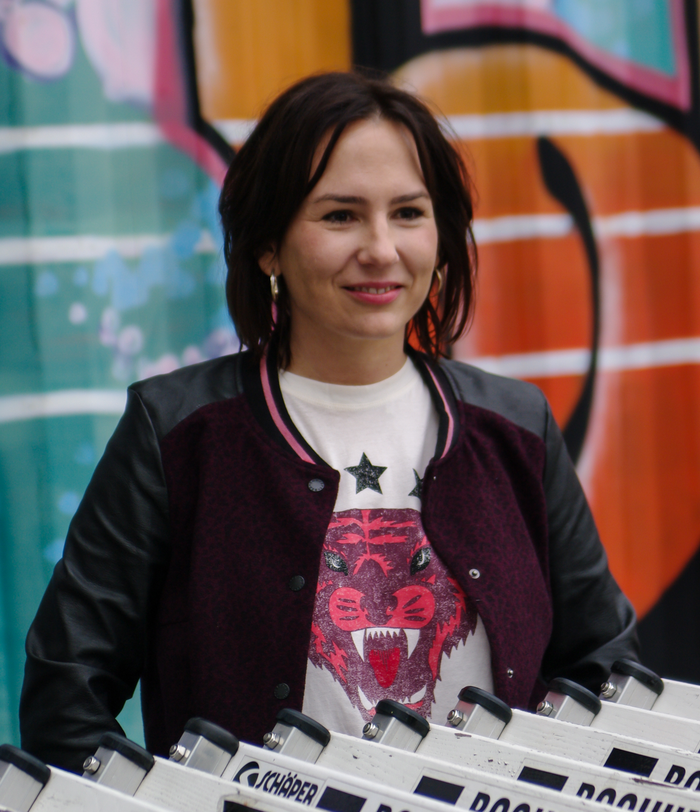 Set-Pressetermin ARD „Heiter bis tödlich - Koslowski & Haferkamp" im Stadion von Wattenscheid 09 am 11. Oktober 2013